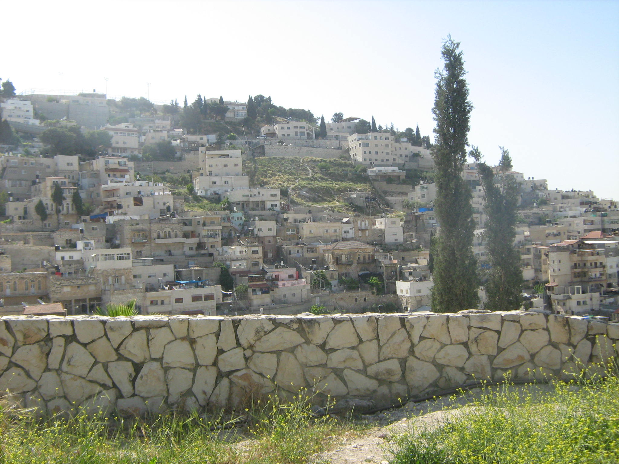 Деревня_Сильван 2012 год